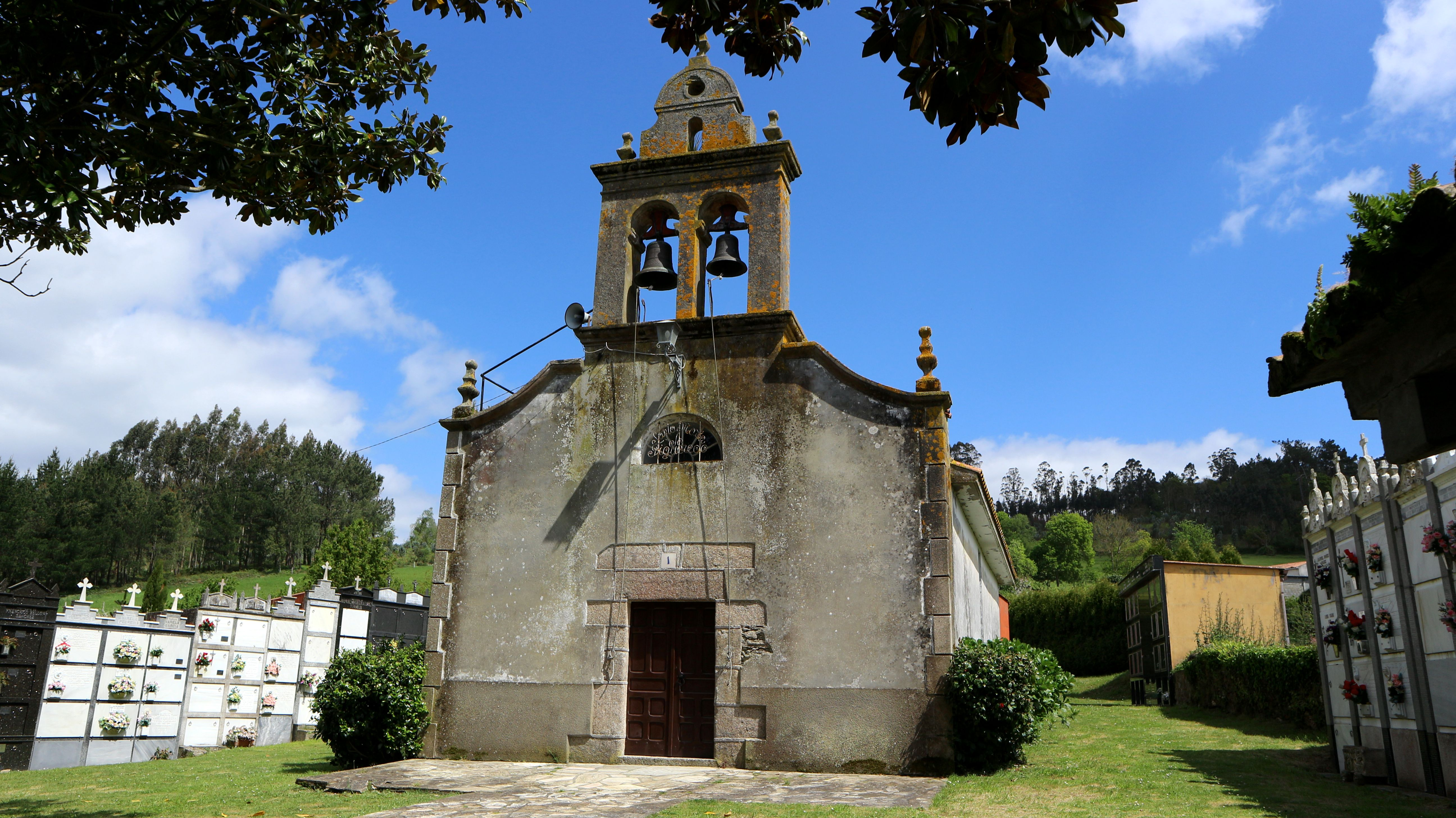 Igrexa de Santa María de Figueredo. Figueredo, Oza-Cesuras.